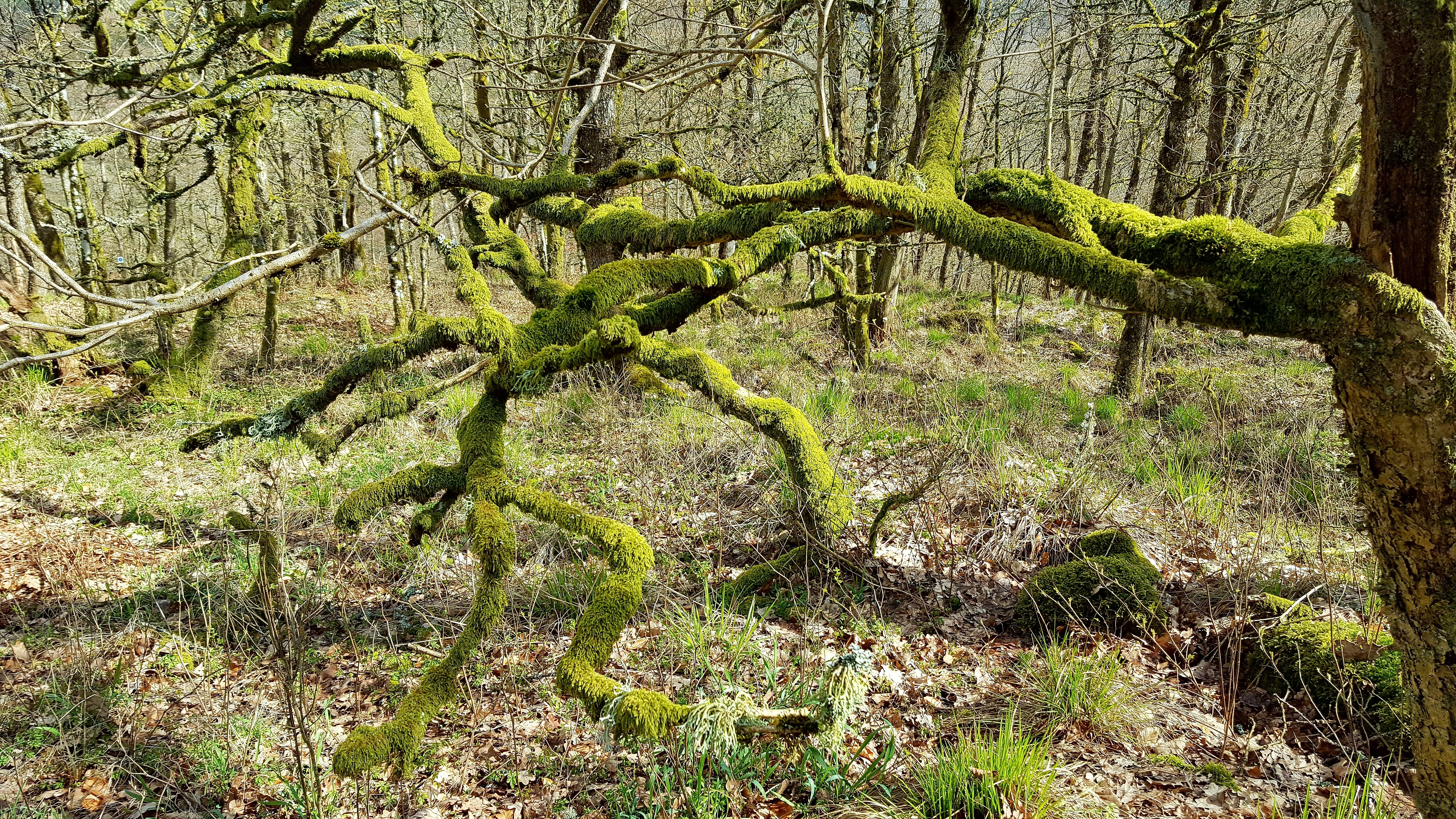 Mossiga träd i Virsehatt